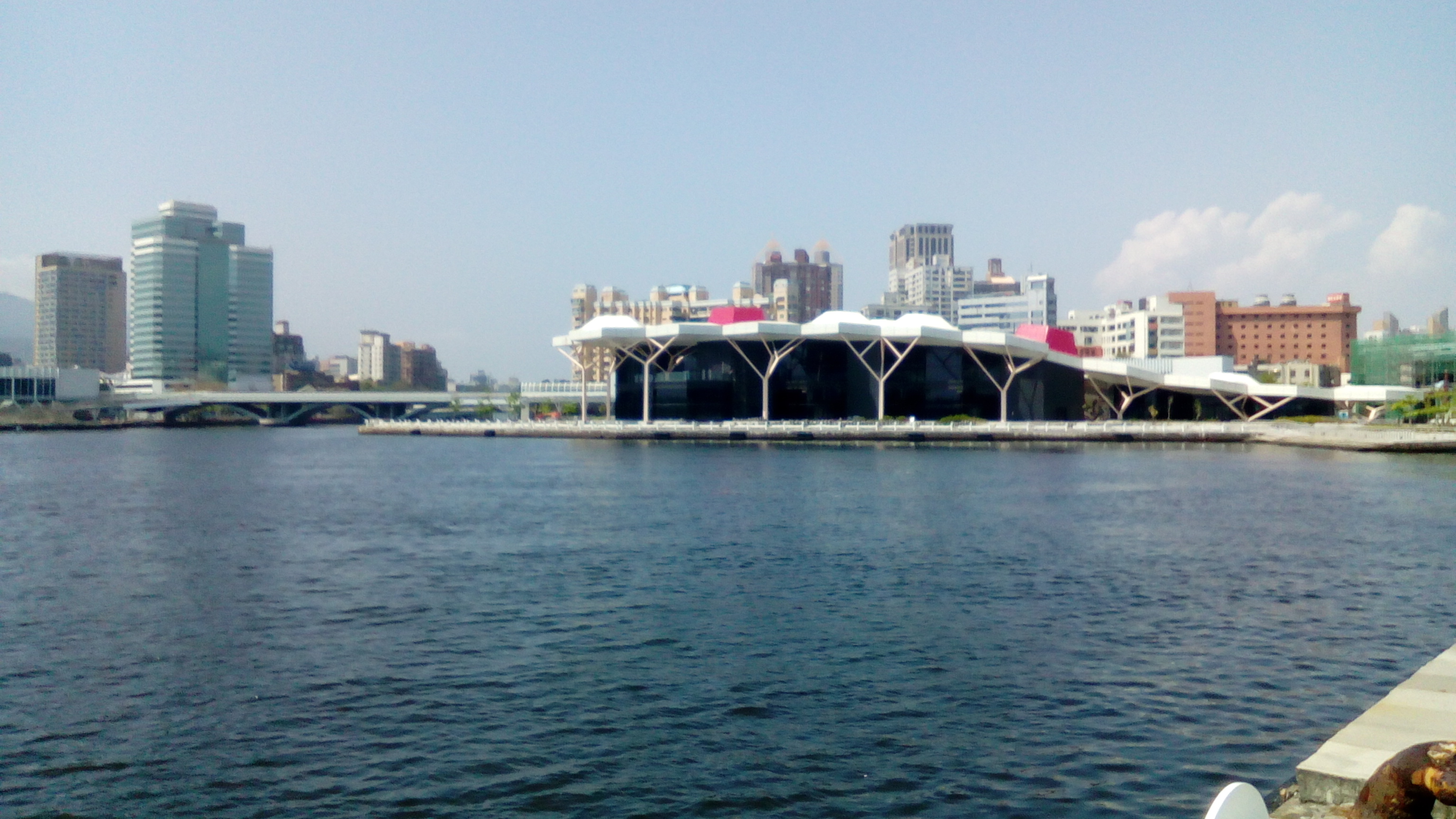 位於愛河東岸之場館